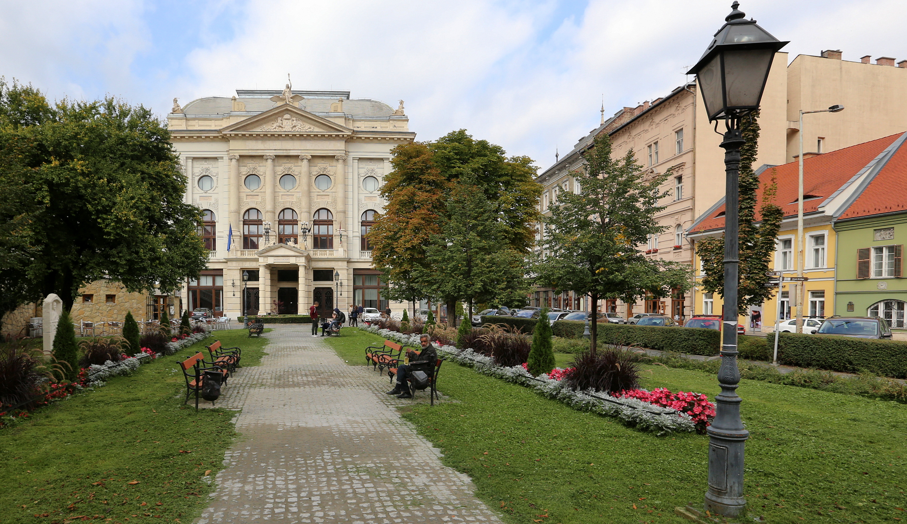 Budai Vigadó This is a photo of a monument in Hungary. Identifier: 12221